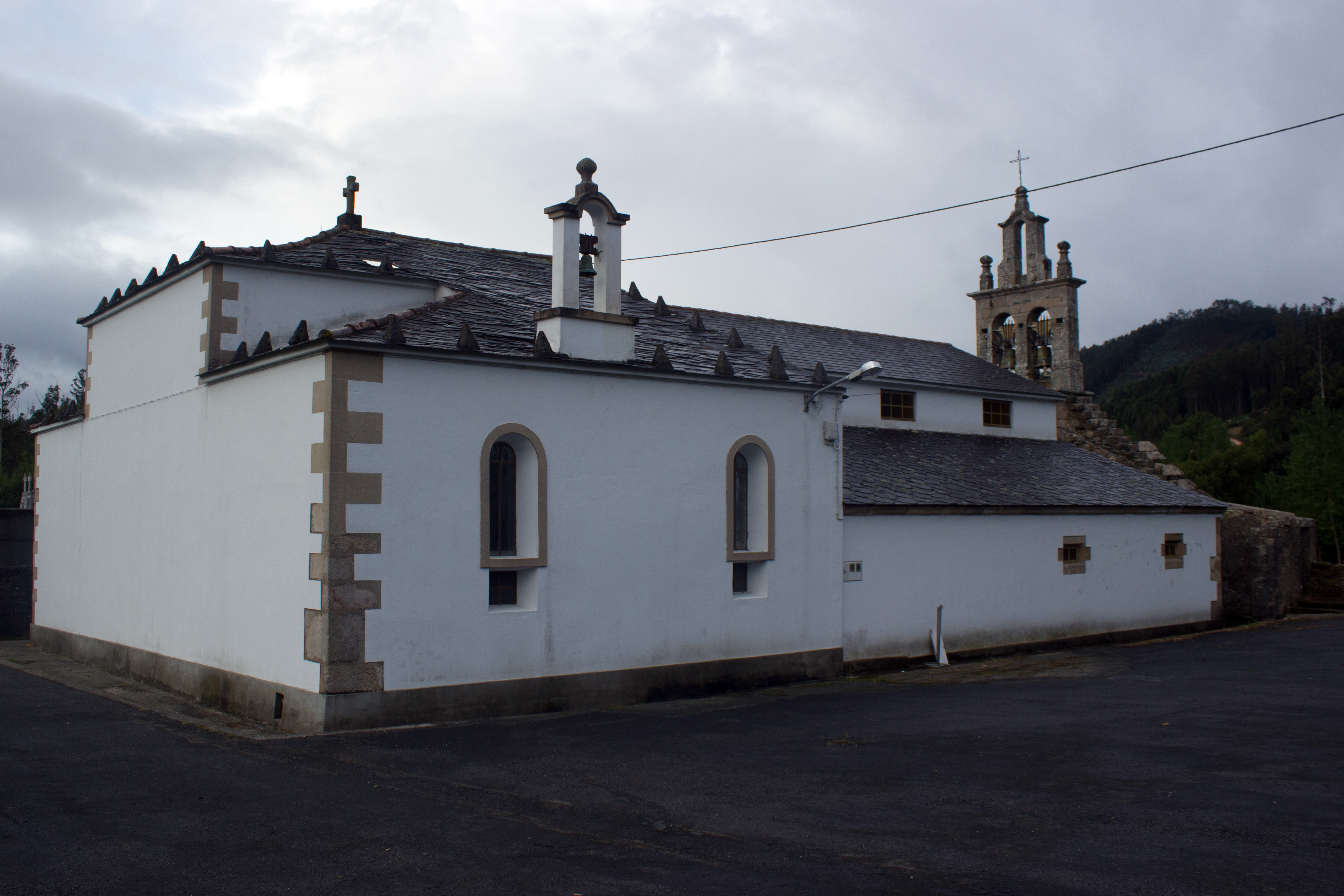 Igrexa de Santa Eulalia de Merille no concello de Ourol.